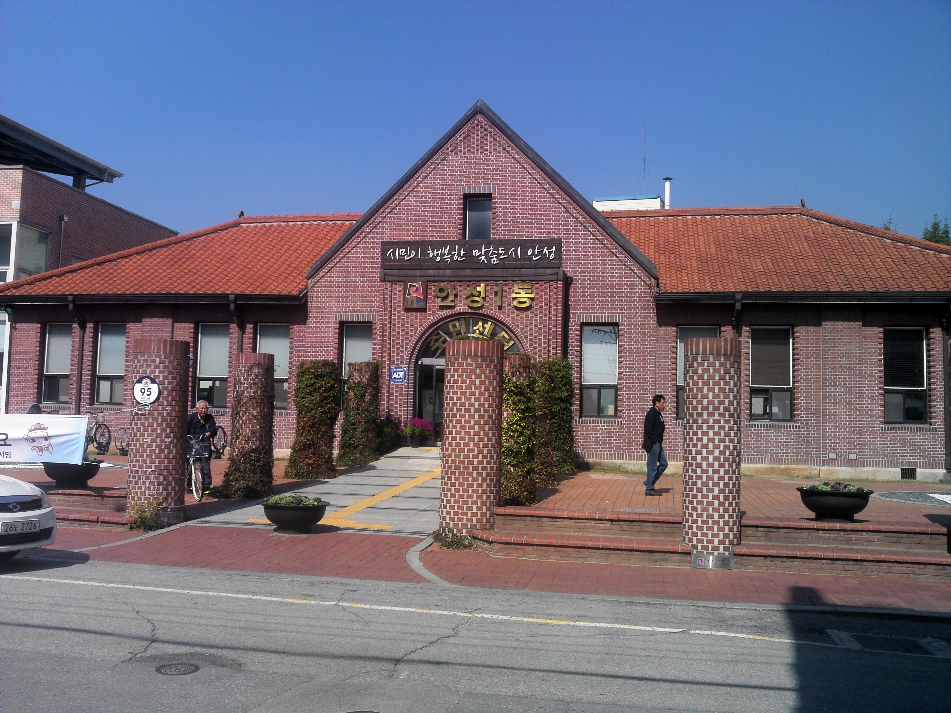 안성1동 주민센터